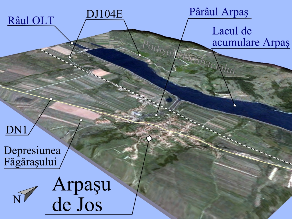 Prelucrare 3D pentru Arpasu de Jos, Sibiu.